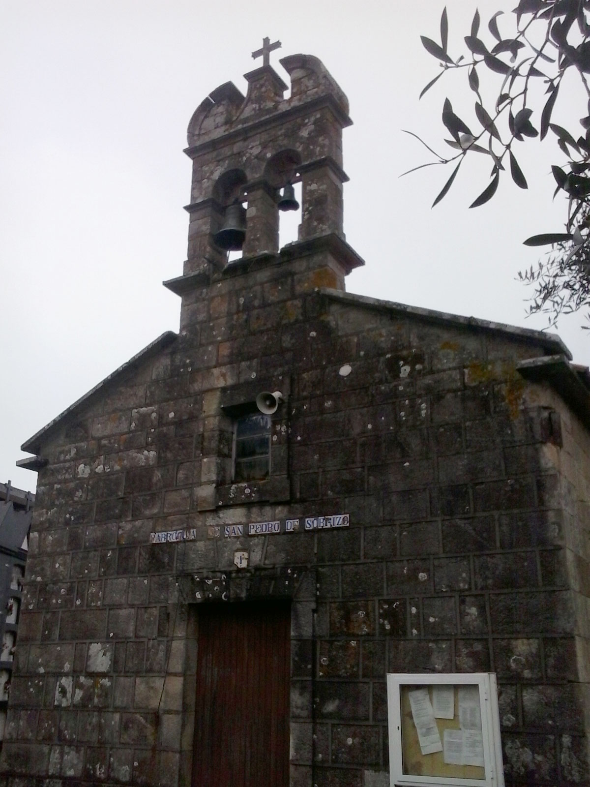 Igrexa de Sorrizo en Arteixo, A Coruña Galiza Spain